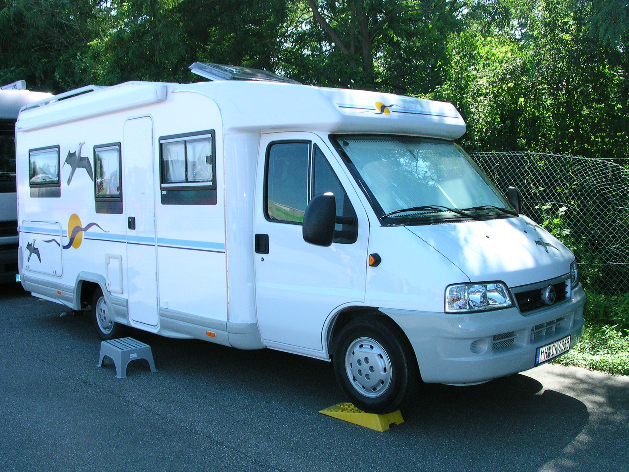 großes Oldtimertreffen im Mercedes-Werk in Wörth am Rhein 2006